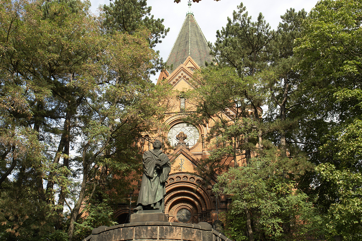 Görlitz, Lutherkirche (Außenansicht mit Lutherdenkmal)